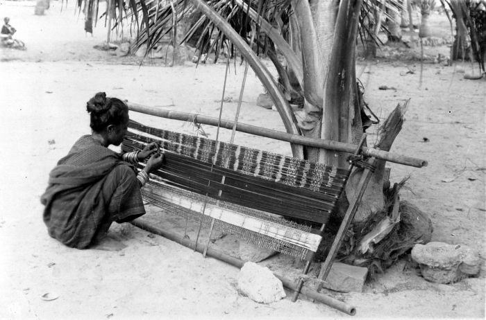 Repronegatief. Sika-vrouw aan het ikatten, Oost-Flores